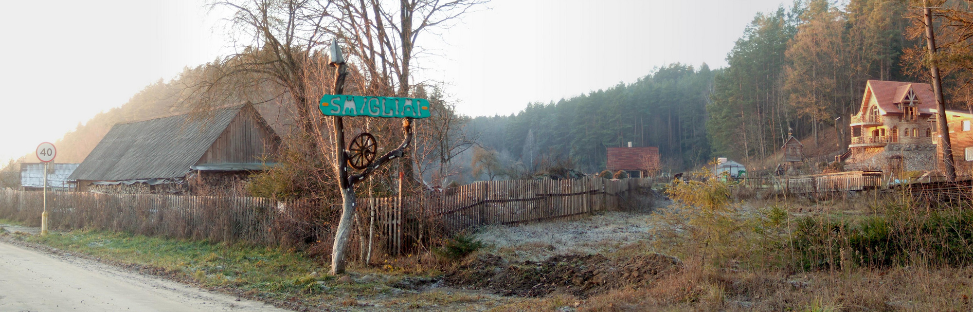 Smiglių kaimas